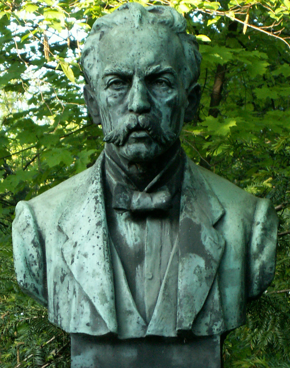 autor: pl: Macieias Marian Raciborski - Botanical Garden Marian Raciborski - Ogród Botaniczny